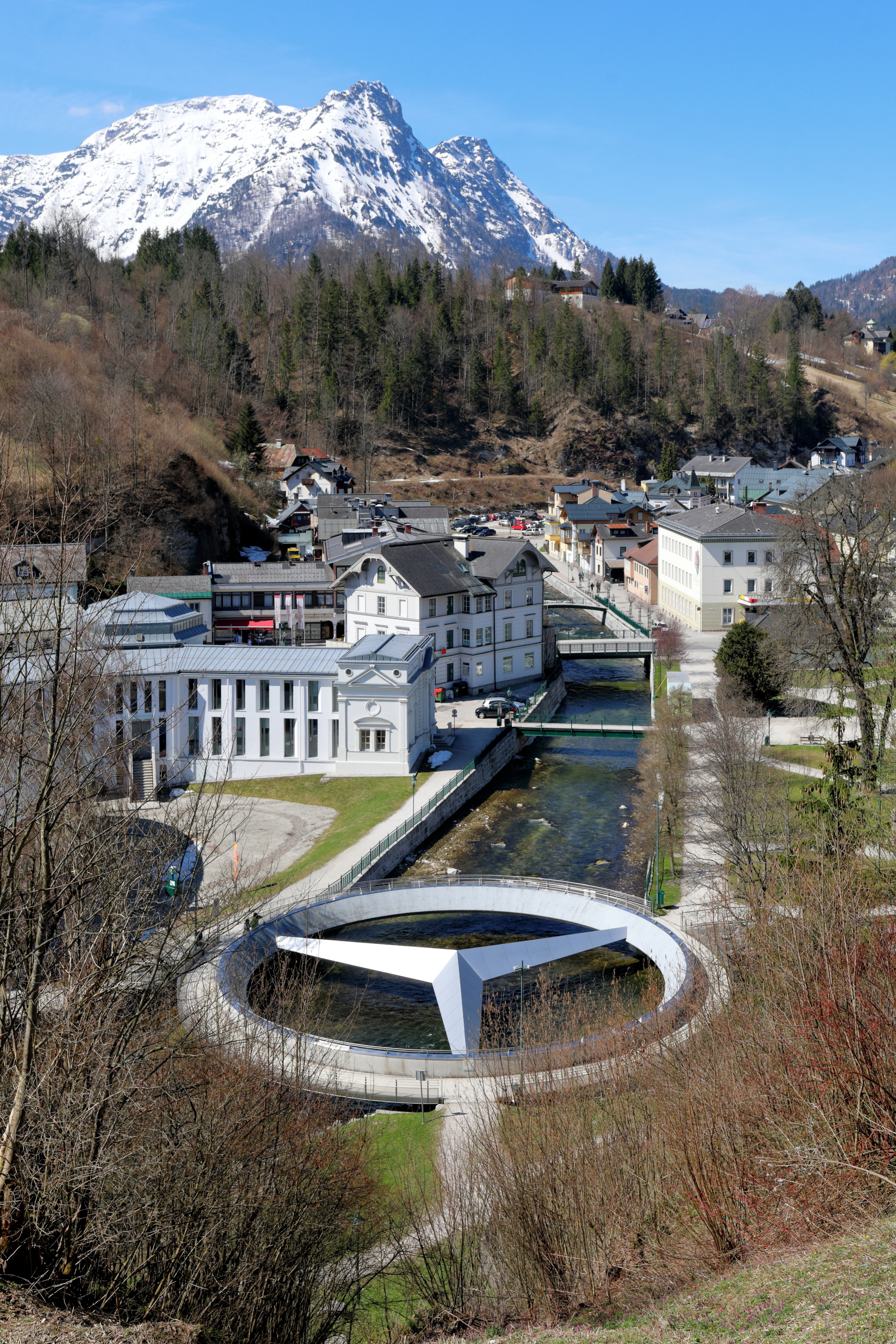 Blick von Osten auf die Mercedes-Brücke beim Zusammenfluss der Grundlseer Traun und der Altausseer Traun (und zugleich am geografischen Mittelpunkt Österreichs) in der steirischen Stadtgemeinde Bad Aussee. Im Hintergrund v.l.n.r der Hohe Sarstein mit einer Höhe von 1975 m, der Niederer Sarstein und der Schwarzkogel.Die Fußgängerbrücke, ein geschlossener Stahlbetonring mit eingehängtem Mercedesstern, hat einen Außendurchmesser von 30 m, eine Gehwegbreite von 2,0 m und wurde im April 2005 feierlich eröffnet.